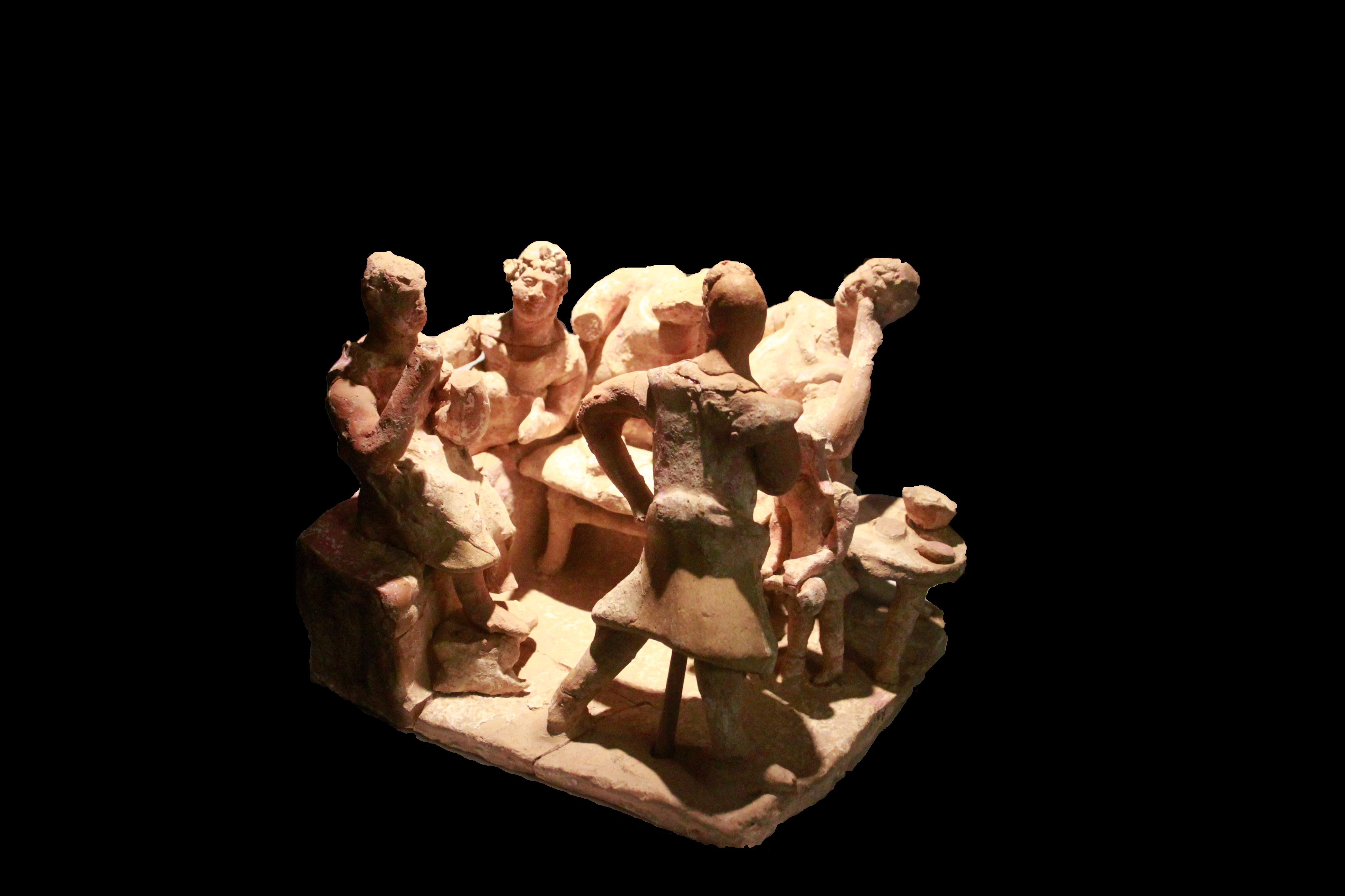 Il banchetto. Scultura rinvenuta nella tomba a camera detta del "Banchetto" nel 1978 a Egnazia, in Puglia. Conservata al Museo archeologico nazionale di Egnazia. La tomba venne utilizzata dal IV al II secolo a.C. La scena illustrata è quella del "banchetto funerario" (περίδειπνον; perídeipnon) , successivo, insieme alle purificazioni, alla sepoltura.